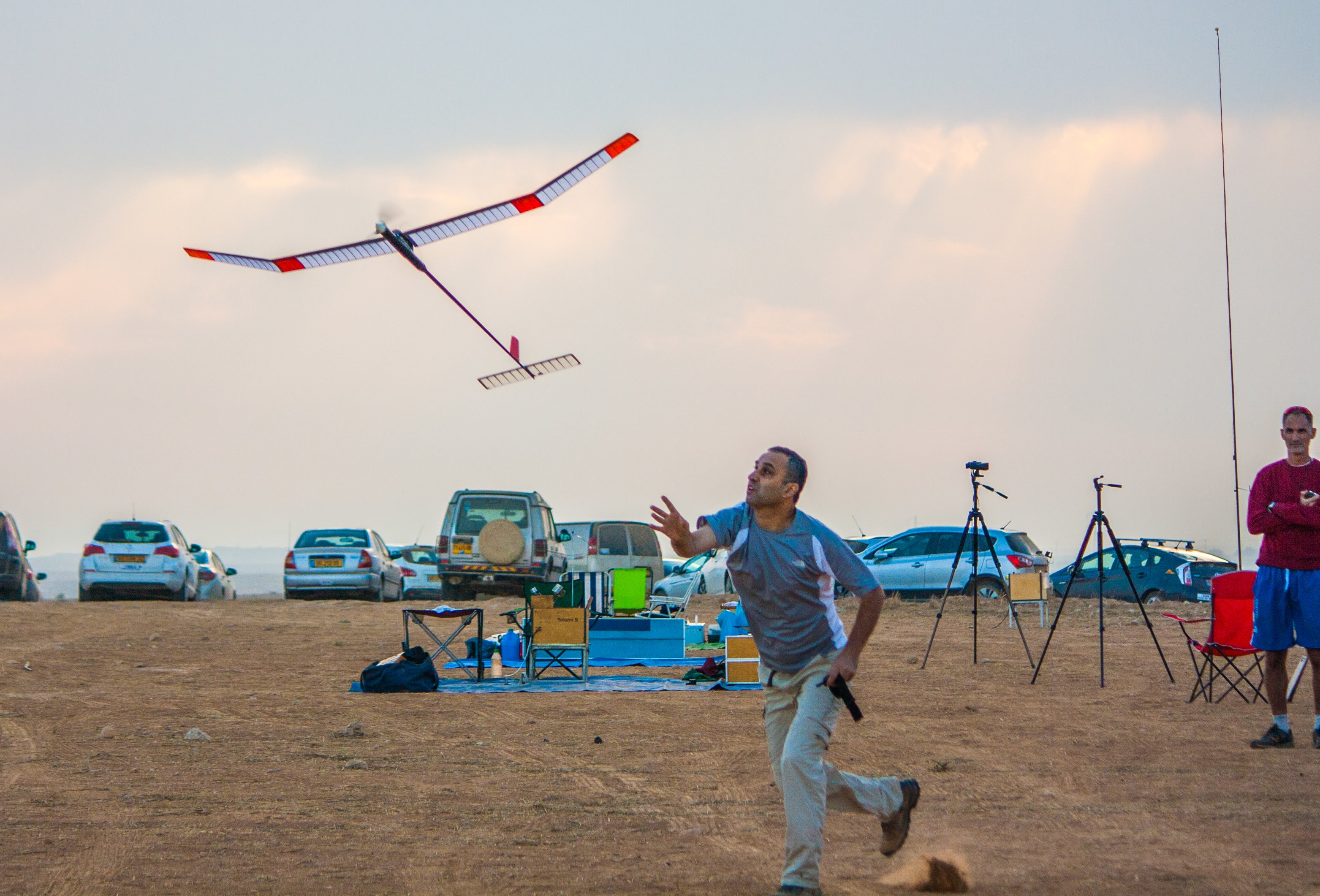 שיגור של טיסן מסוג F1Q ע"י שמוליק סיטון